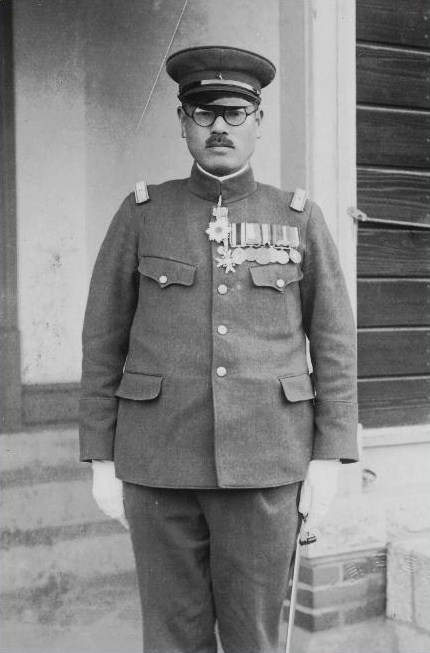 酒井隆、少将時代の写真。